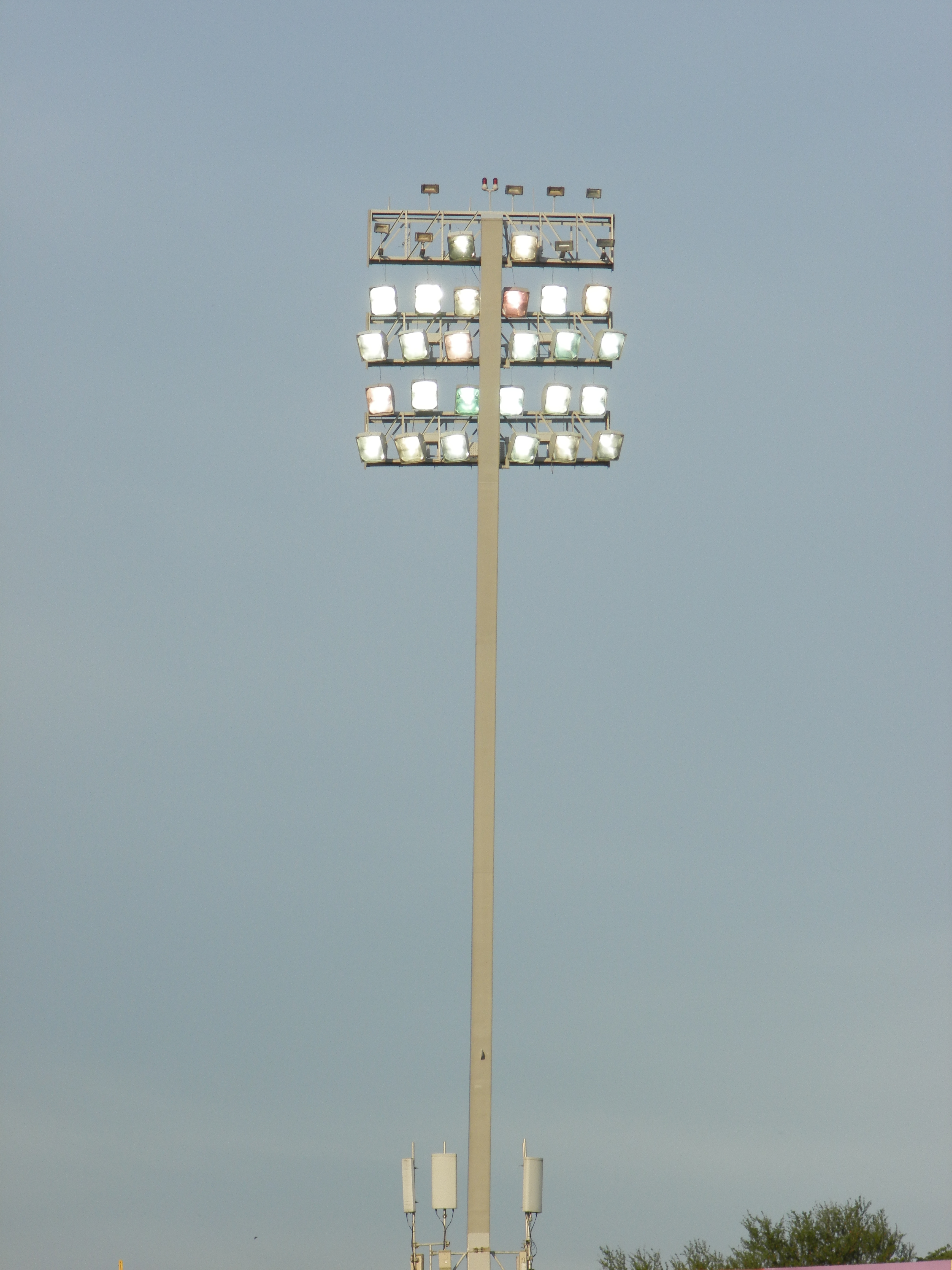 Vista de las torres del tendido eléctrico del Estadio Cuscatlan